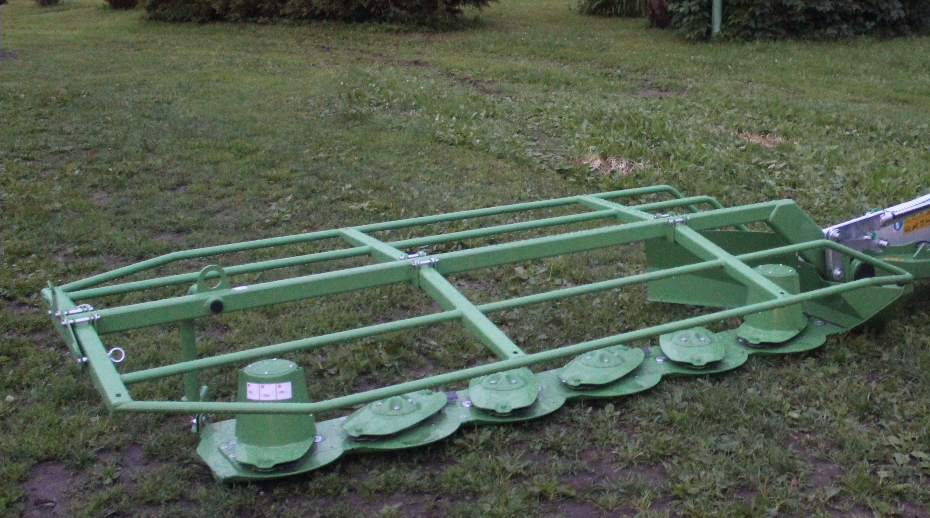 Rootorniiduki lõiketerade rootorid ja lõikelatt